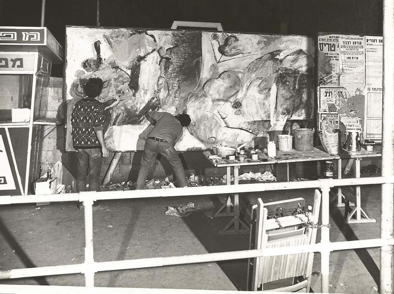 איזיקה גאון ושאול שץ מציירים יחד על לוח מודעות ששכרו מהעירייה, ברחוב קינג ג'ורג' בירושלים. יצירתם הוצגה לעוברי האורח במשך כשבועיים, במחאה על התשלום הגבוה שנהגו לגבות הגלריות בעיר מהאמניםץ